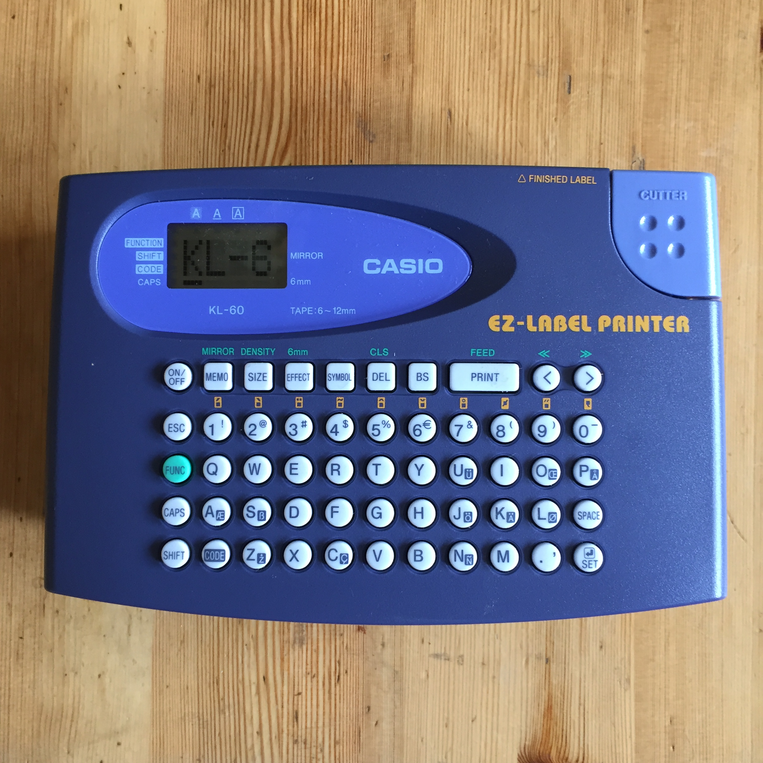 CASIO Labelprinter KL-60